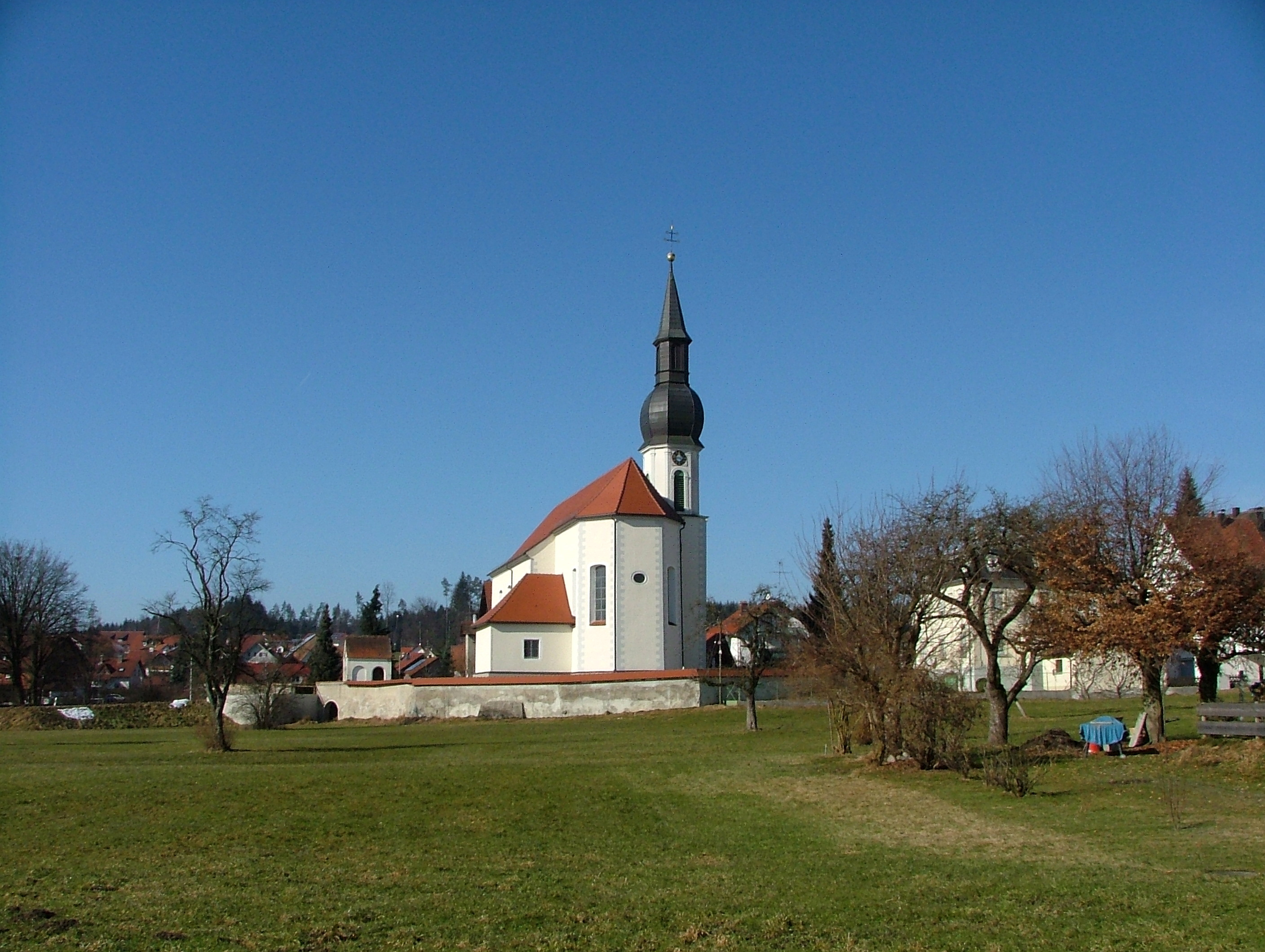 St. Michael, Esseratsweiler